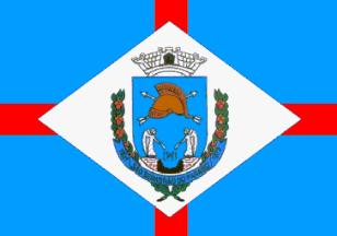 Bandeira do município de São Sebastião do Paraíso, Minas Gerais, Brasil.